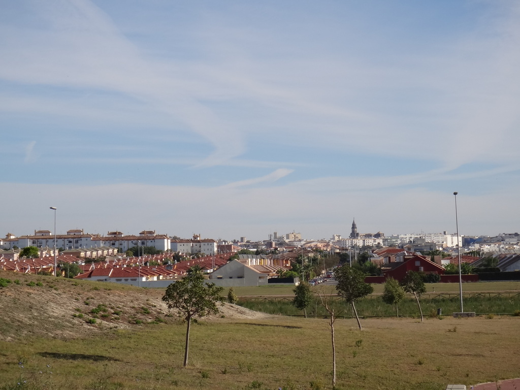 Vista de Jerez desde la Laguna de Torrox